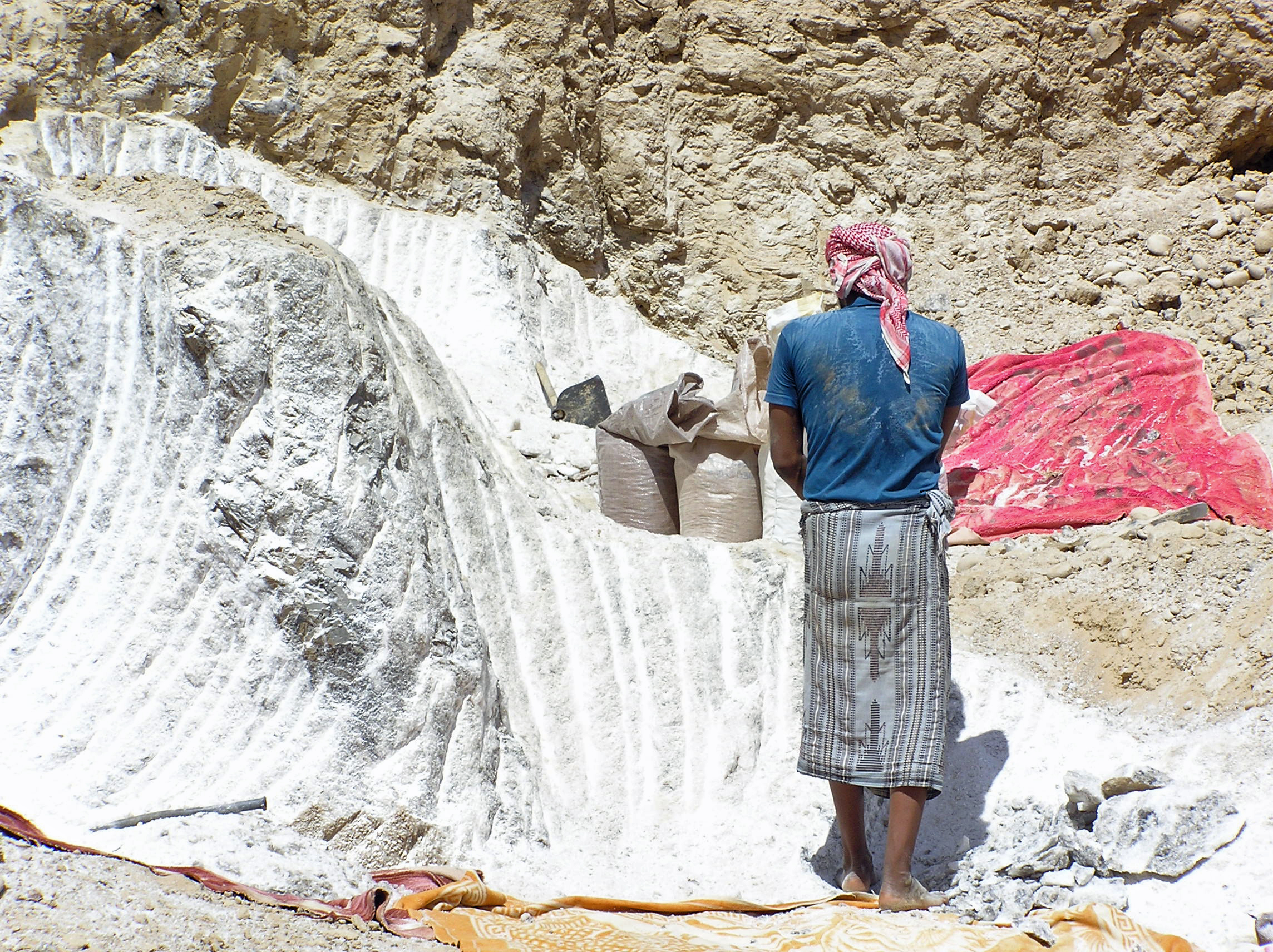 Yémen - Mine de sel à ciel ouvert à proximité de Shabwah